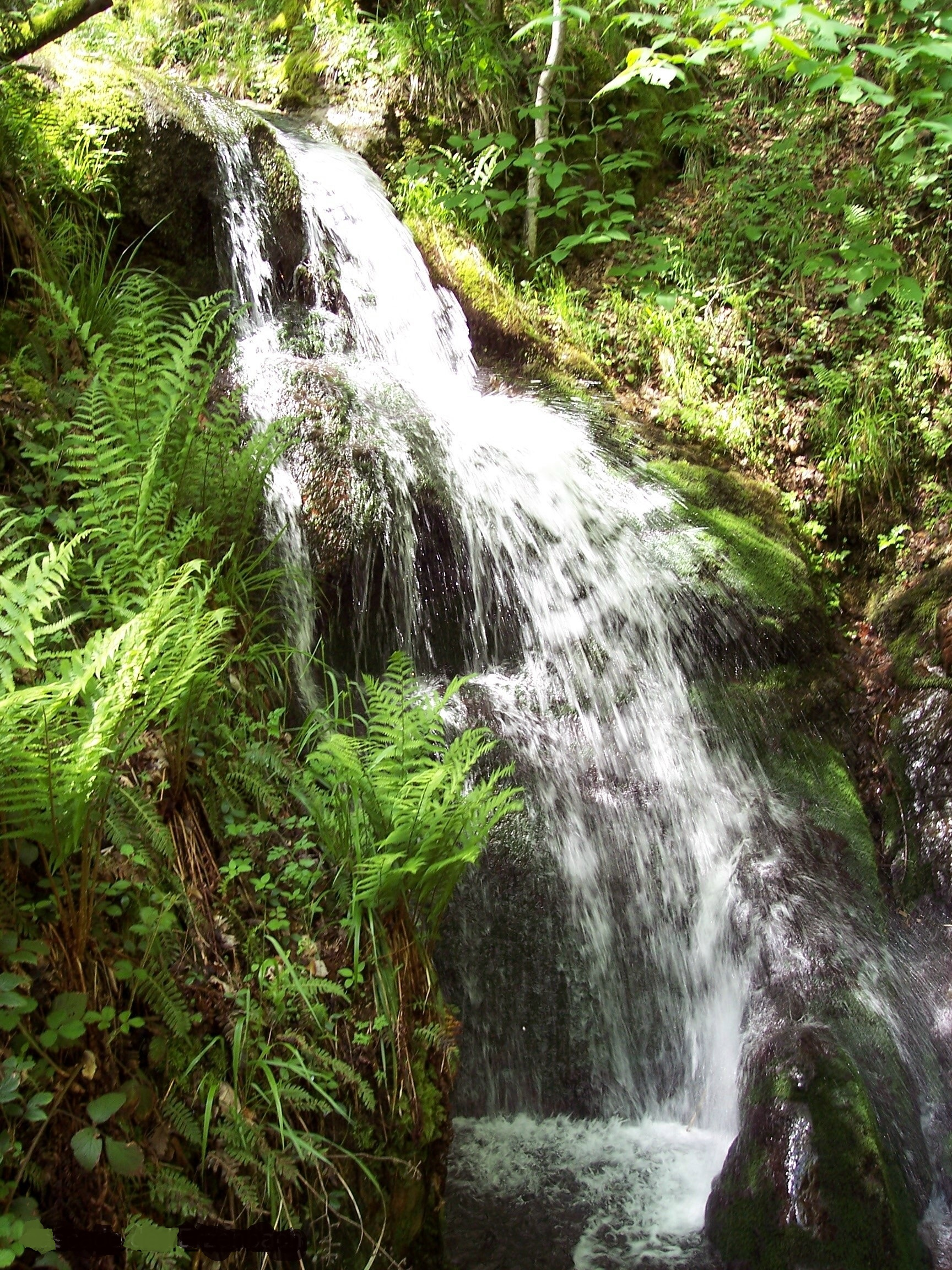 Cascade de l'Erzenbach, commune de Steinbach.